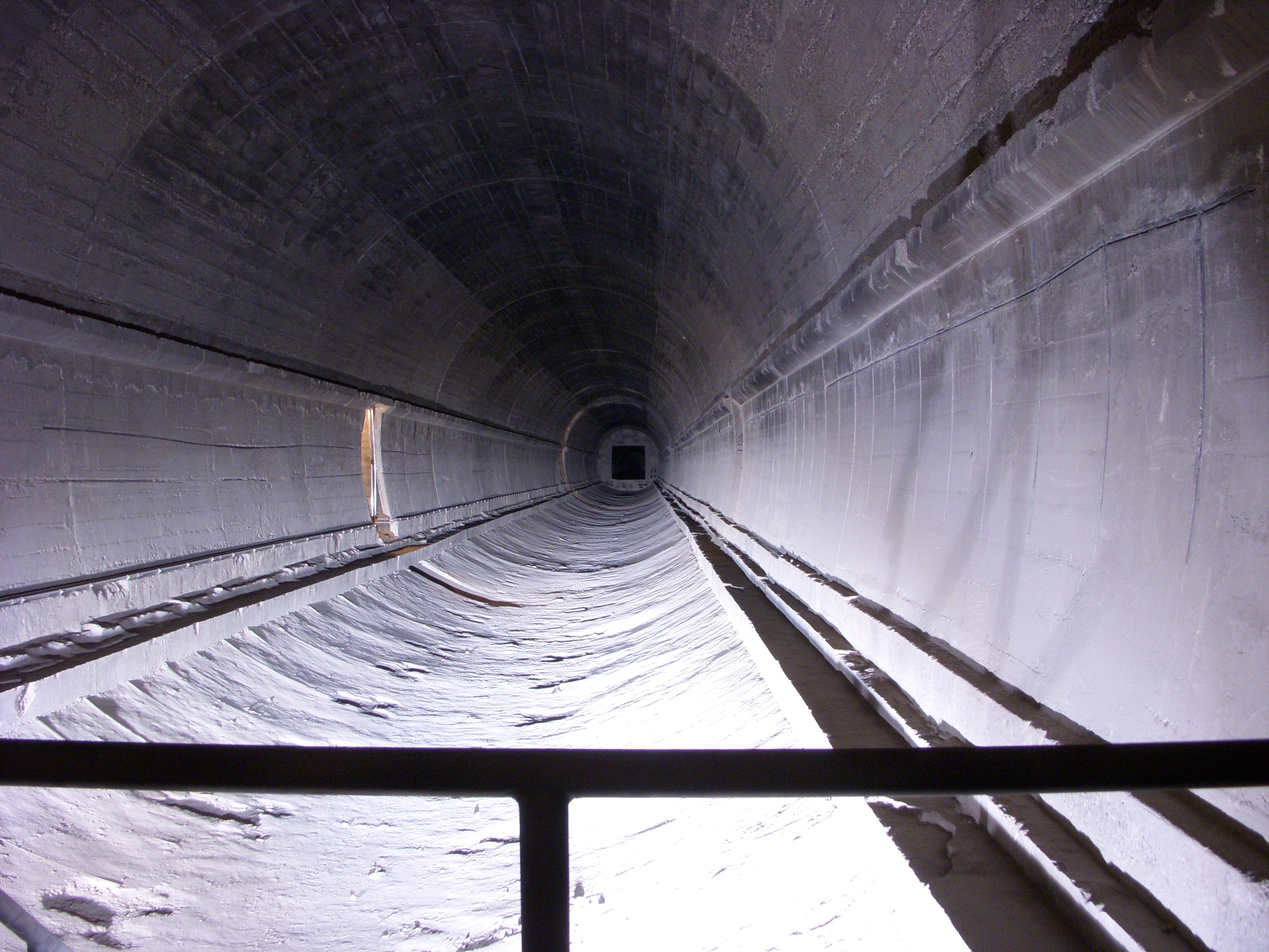 Der Regierungsbunker im Ahrtal, die leere Tunnelröhre